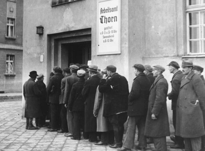 Schnelle Arbeitsvermittlung in Thorn In kürzester Zeit ist es den deutschen Stellen gelungen, überall in den ehemaligen polnischen Gebieten die Zahl der Arbeitslosen ganz gewaltig zu mindern. In Thorn beispielsweise sind bis jetzt von über 10.000 Arbeitslosen über die Hälfte untergebracht worden, die nun am Aufbauwerk mit tätig sind. Täglich finden weitere Hunderte Arbeitslose Beschäftigung und sie stehen nicht mehr vergeblich vor dem Arbeitsamt. Atlantic, 26.10.39